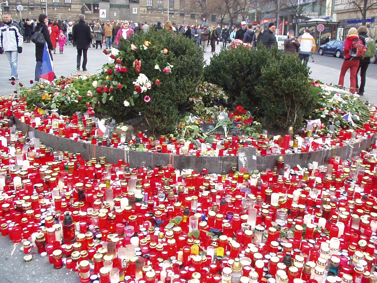 Václavské náměstí dne 22. 12. 2011